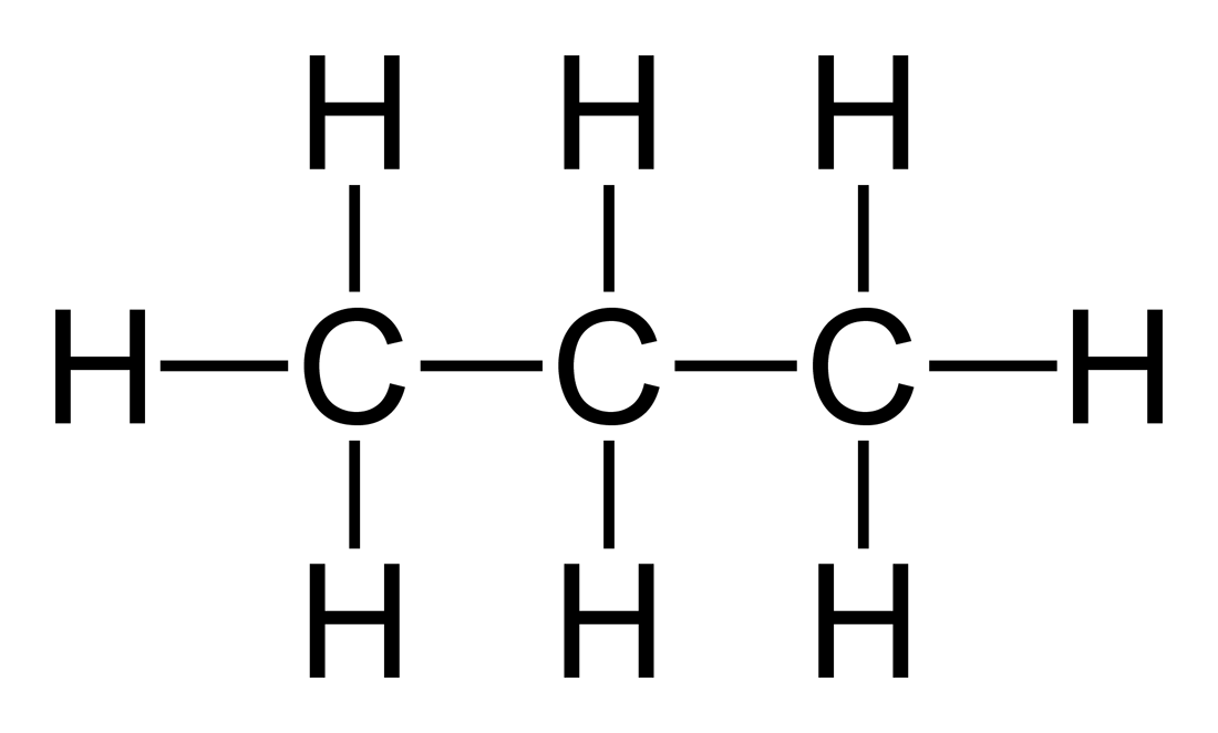 Propan